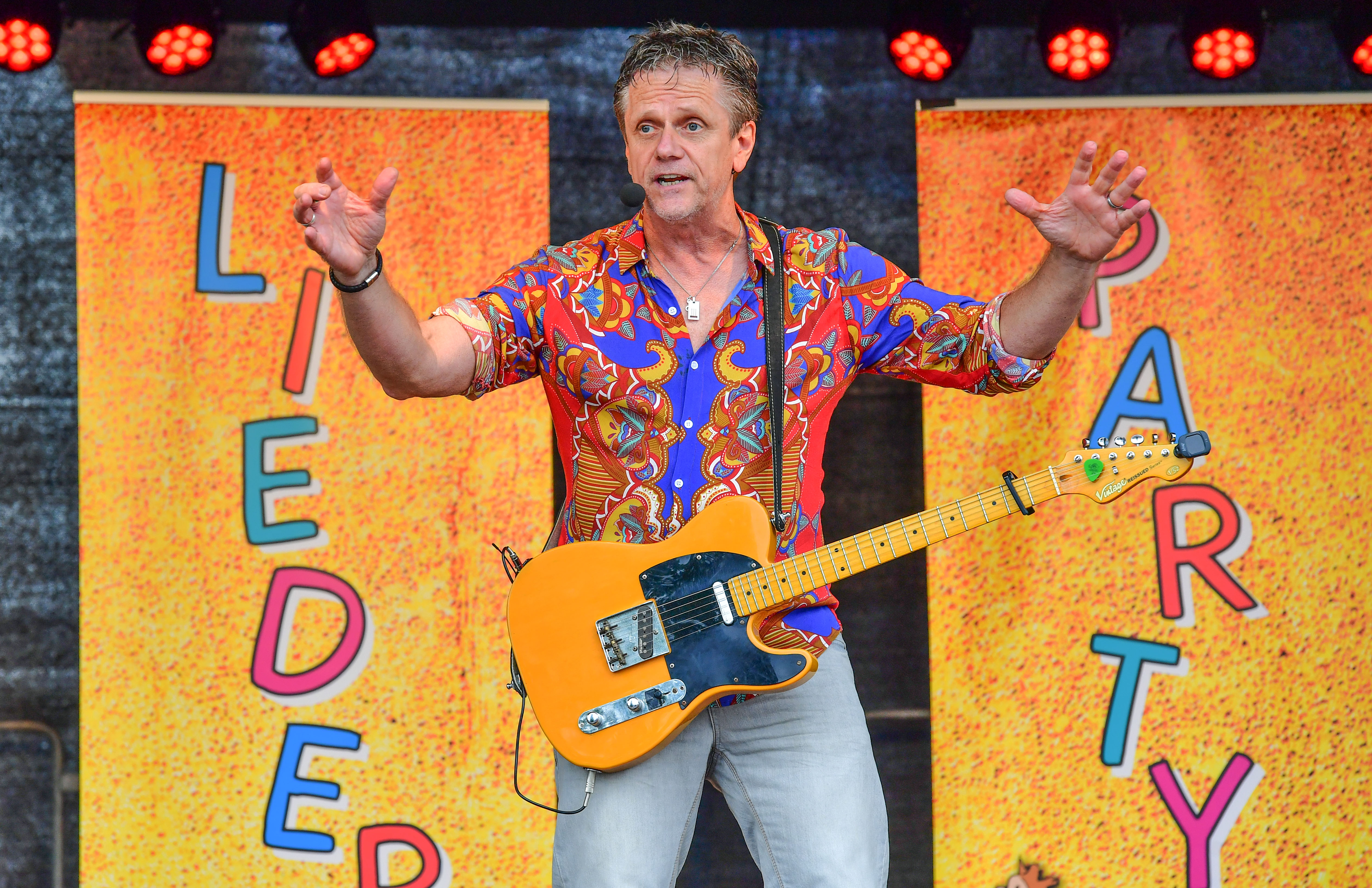 Der Musiker Martin Pfeiffer auf einer Bühne bei einem Live Konzert im Jahr 2019